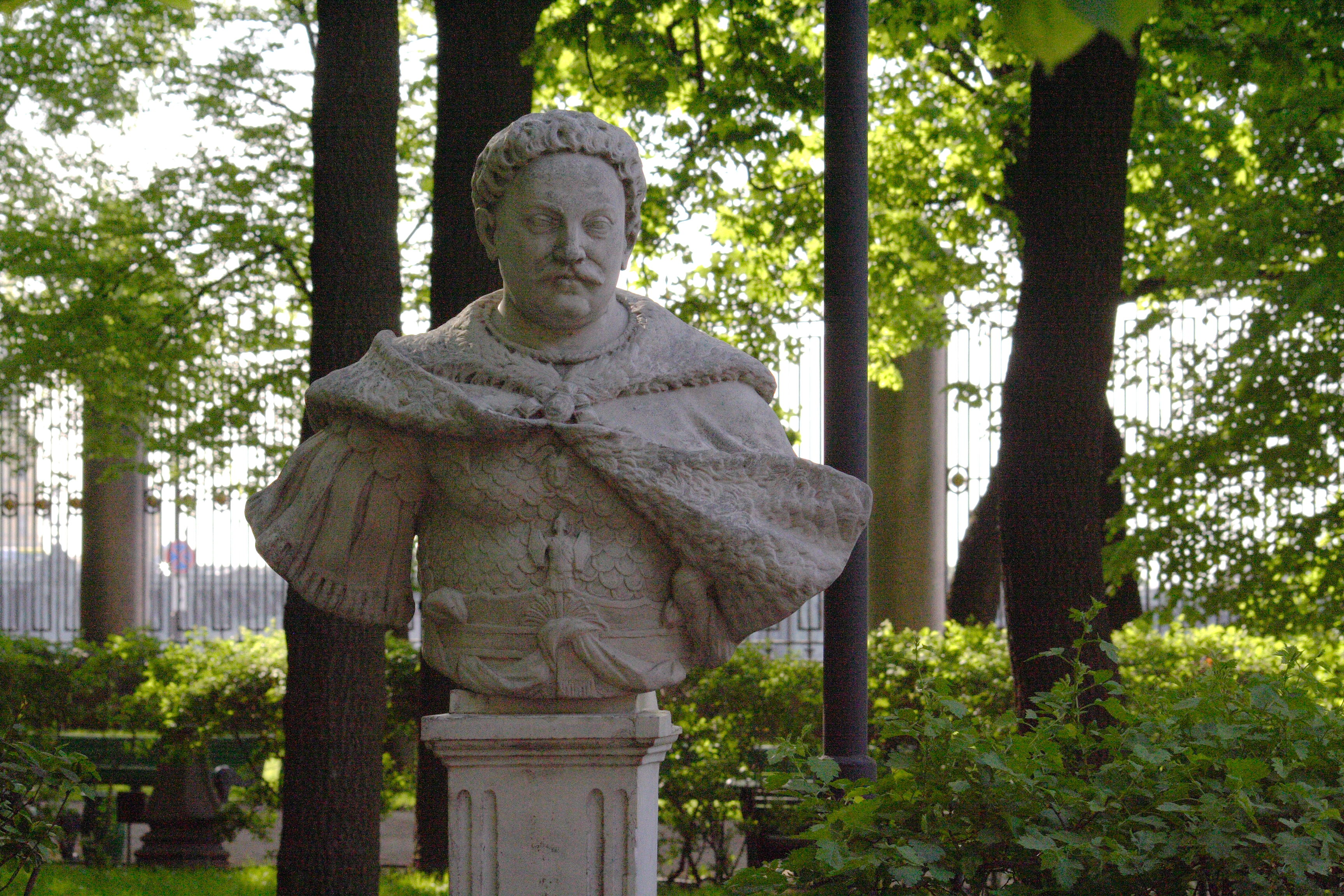 бюст Яна Собесского